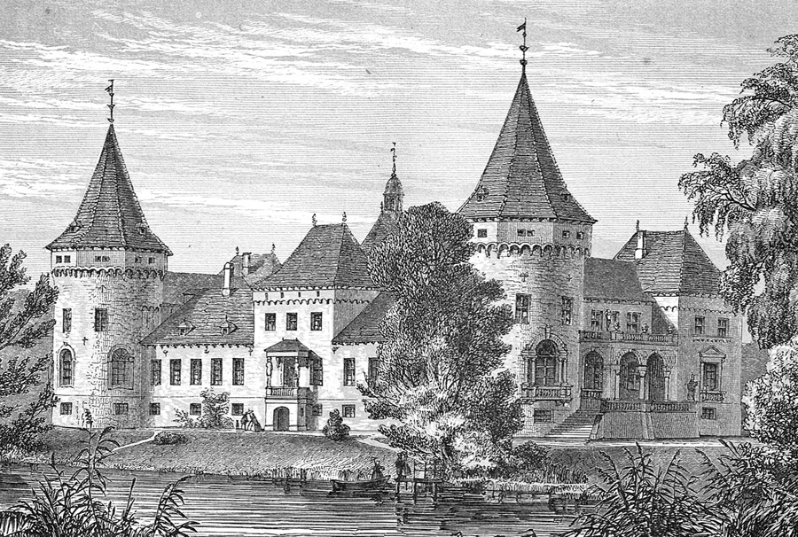 Pederstrup er en gammel hovedgård, som nævnes første gang i 1340. Gården ligger i Vesterborg Sogn, Lollands Nørre Herred, Maribo Amt, Højreby Kommune. Hovedbygningen er opført i 1813-1822